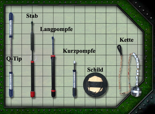 Pompfen-Übersicht